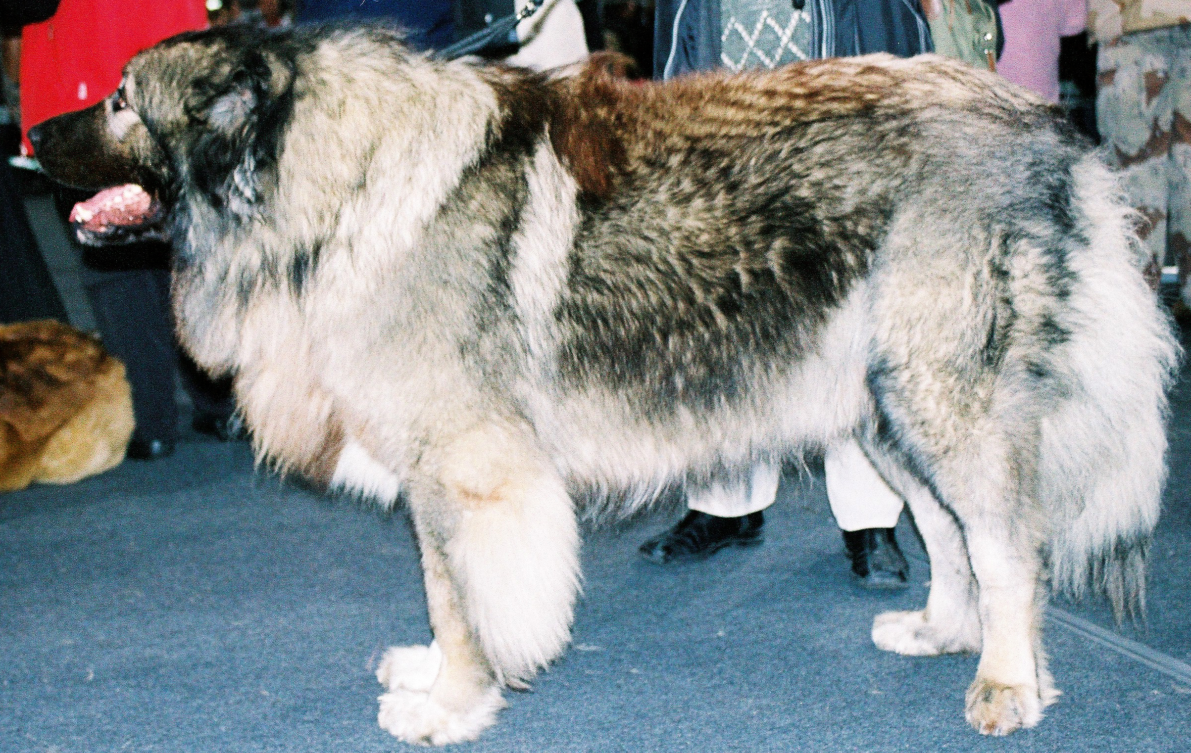 autor: Pleple2000 10:08, 5 April 2006 (UTC)